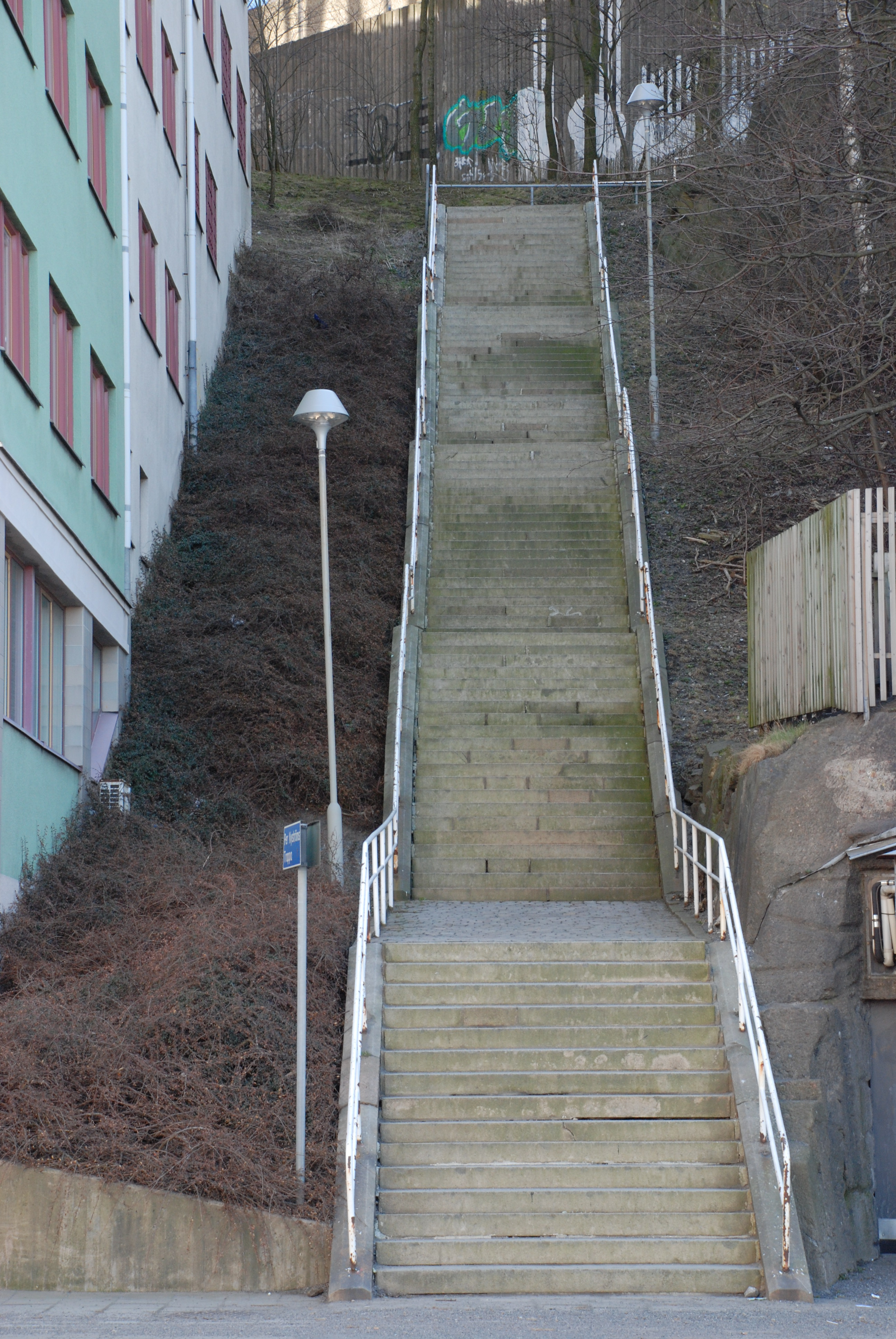 Per Nyströms Trappa i stadsdelen Inom Vallgraven i Göteborg går från Stora Badhusgatan upp till Otterhällan.